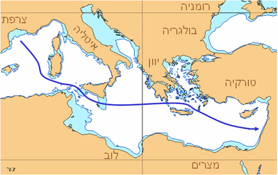 מסלול ההפלגה